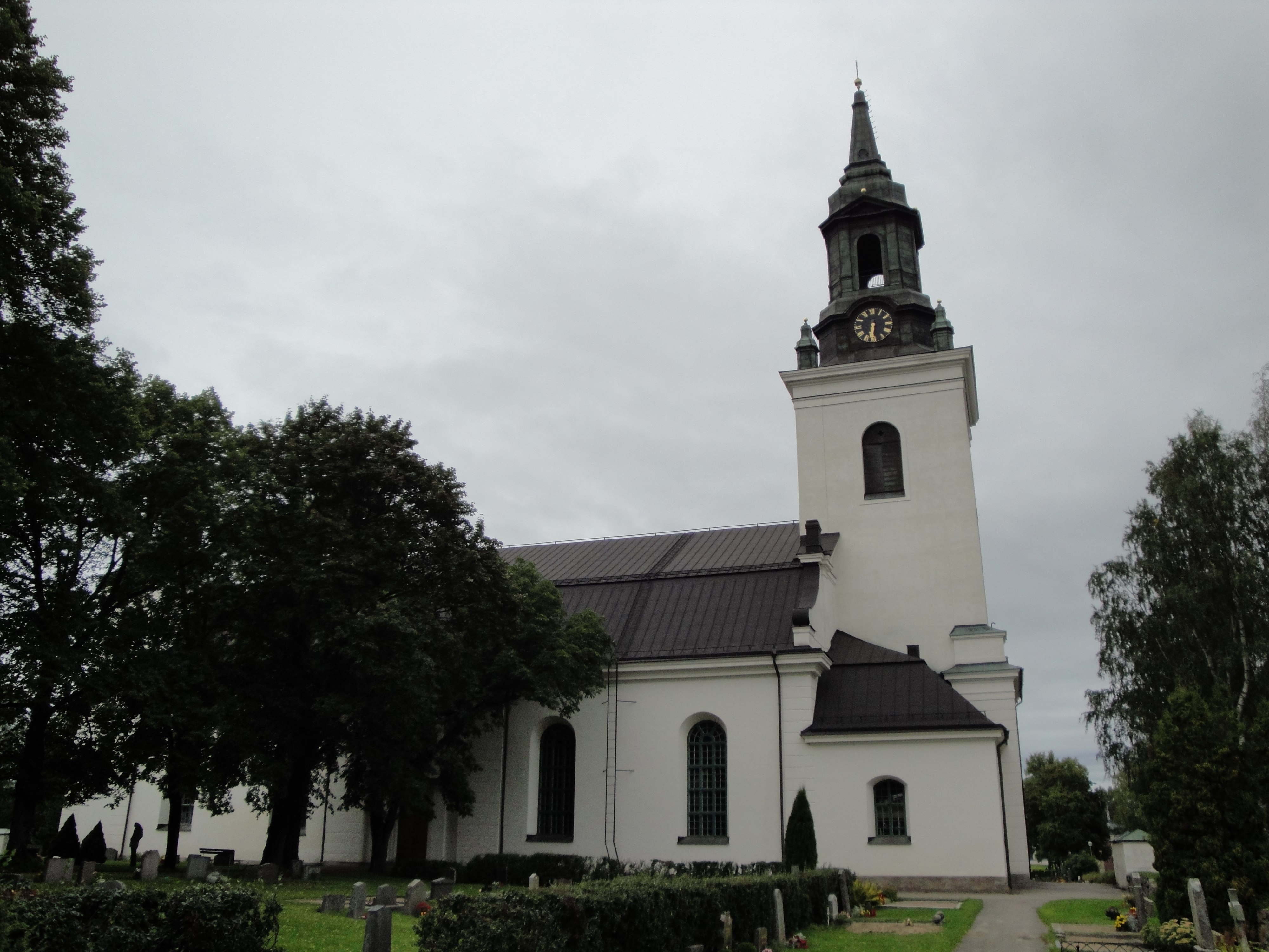 Ockelbo kyrka, Ockelbo kommun, Gästrikland.